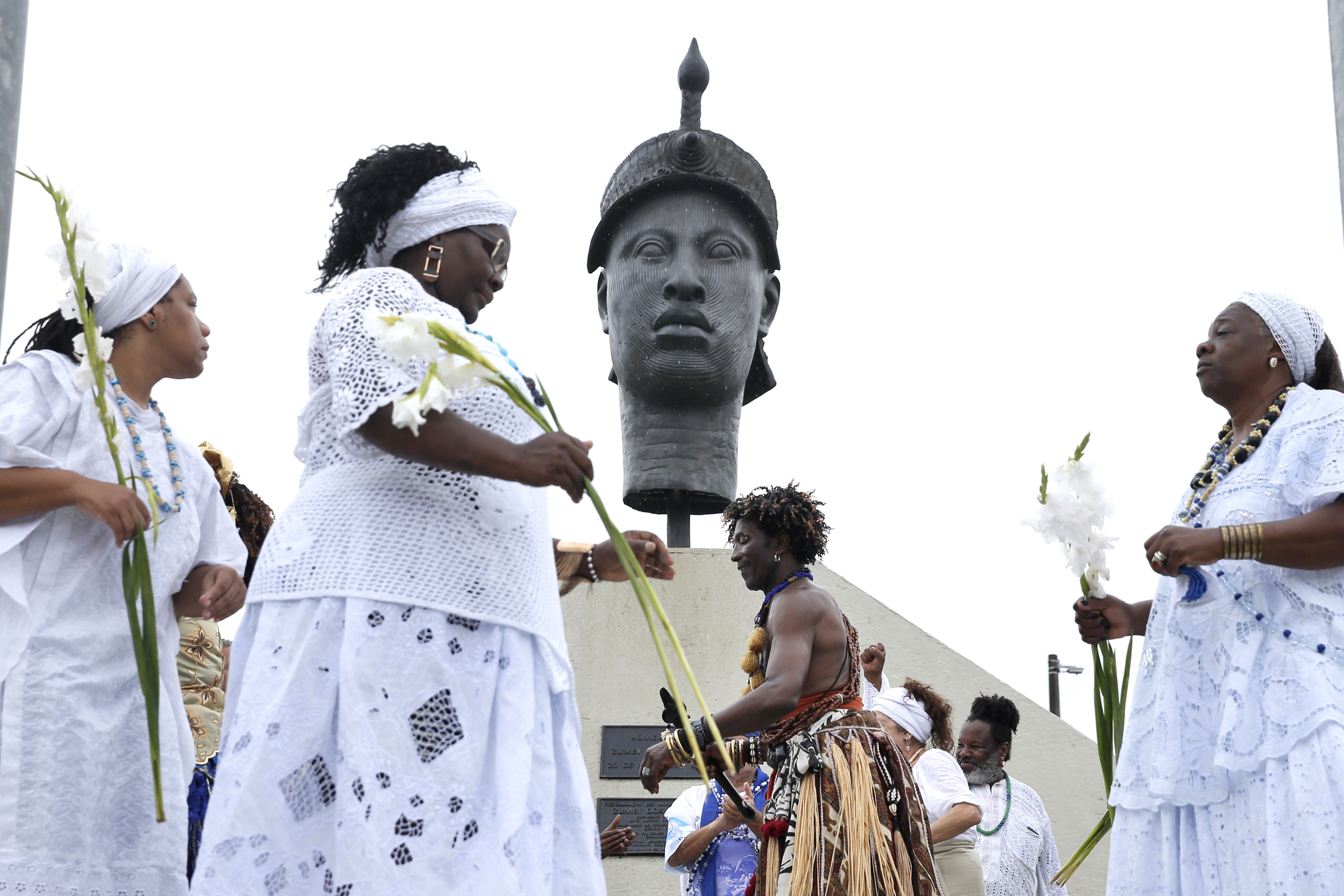 Rio de Janeiro - Em comemoração ao Dia da Consciência Negra, grupos fazem homenagens junto ao Monumento a Zumbi dos Palmares, na região central do Rio de Janeiro (Tânia Rêgo/Agência Brasil)